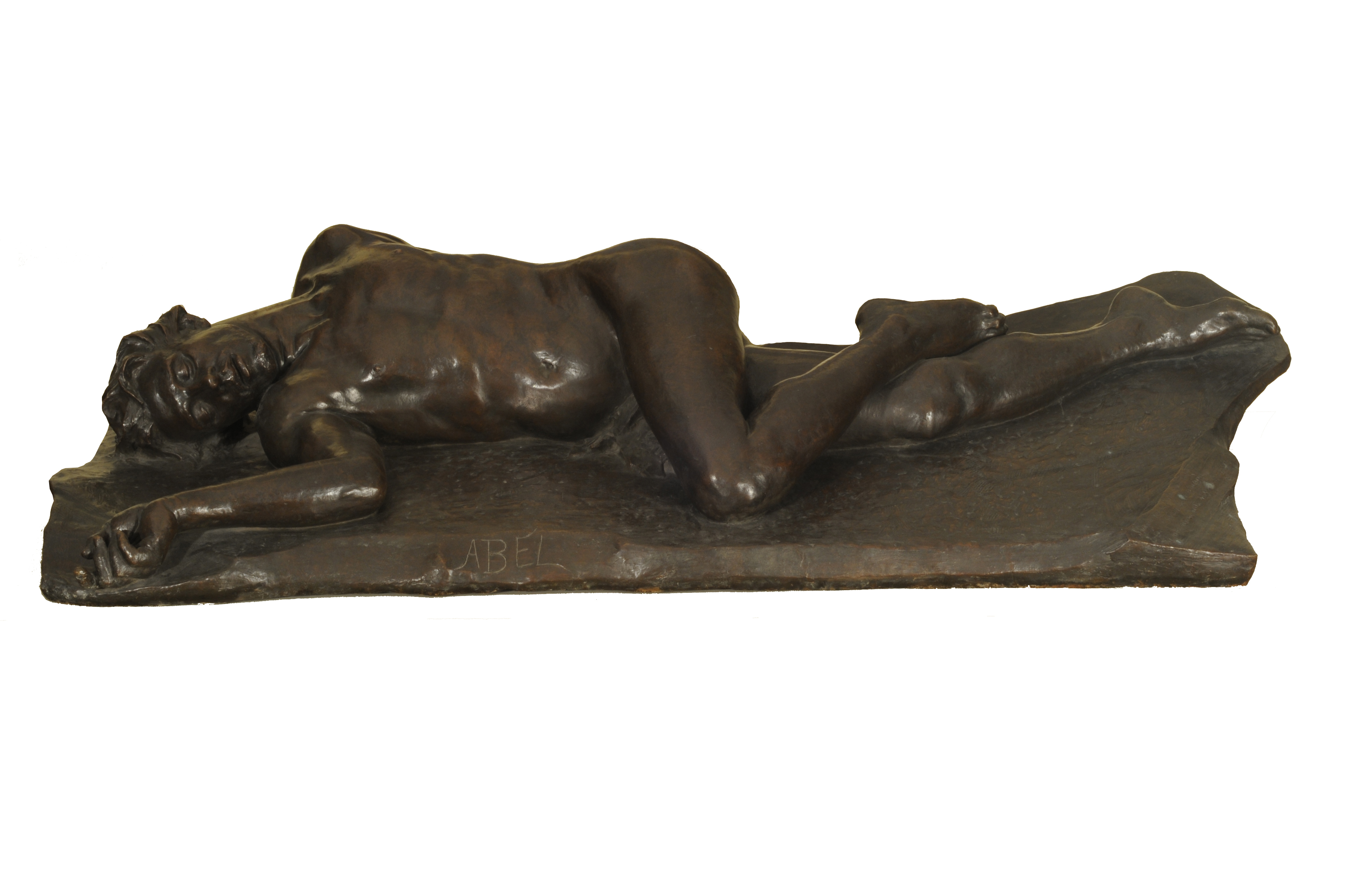 Lucio Correa Morales, Abel. 1902. 47 x 198 x 98 cm, modelado y vaciado de bronce. Inv. 3192.